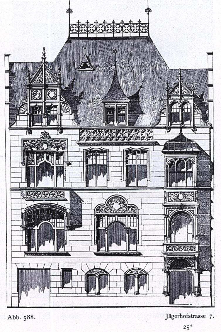 Haus Jägerhofstraße 7 in Düsseldorf, erbaut Ende der 1880er Jahre von den Architekten Heinrich Joseph Kayser und Karl von Großheim für Carl Rudolf Poensgen